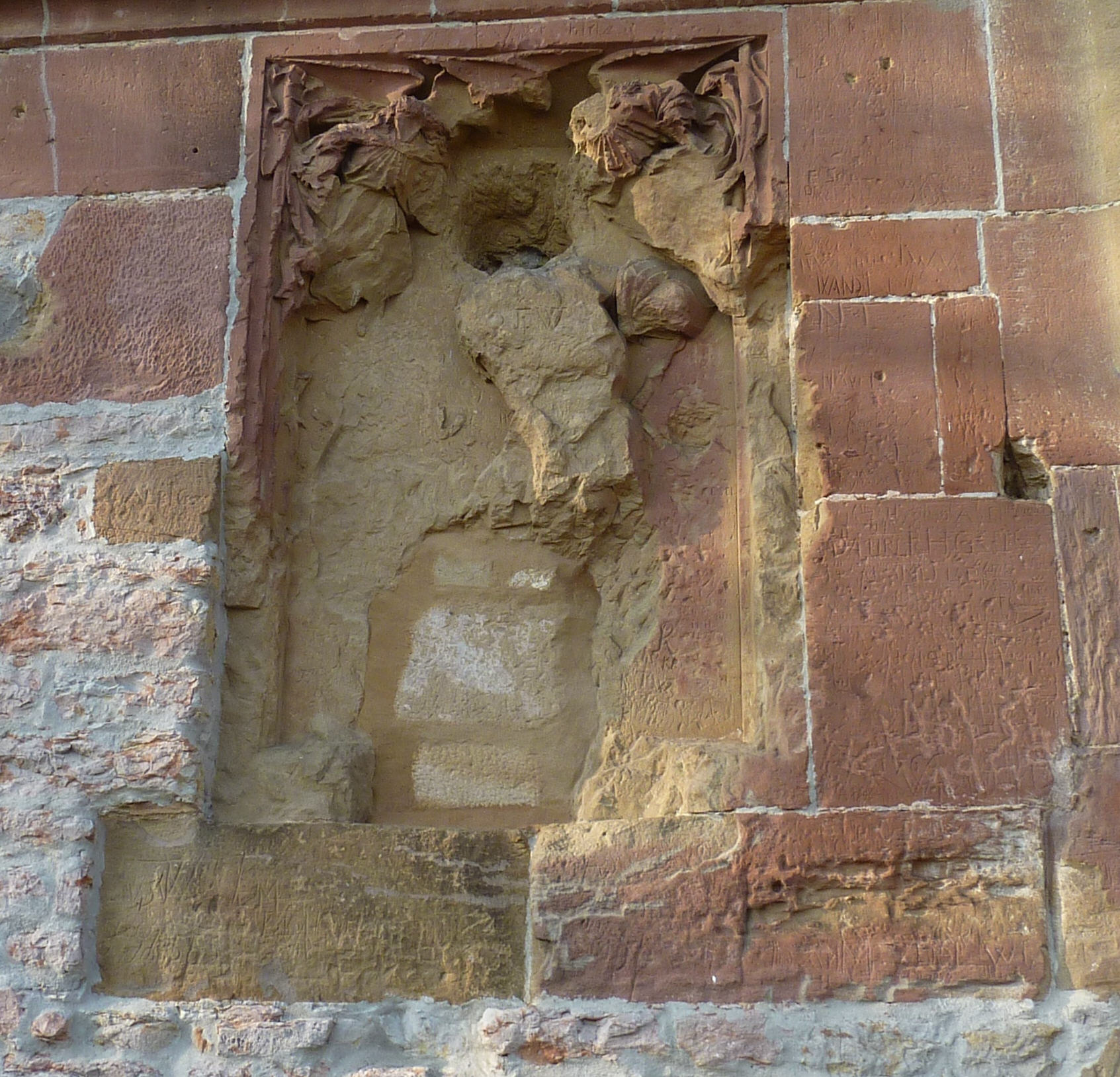 zerstörtes Marienbild an der Anhäuser Mauer